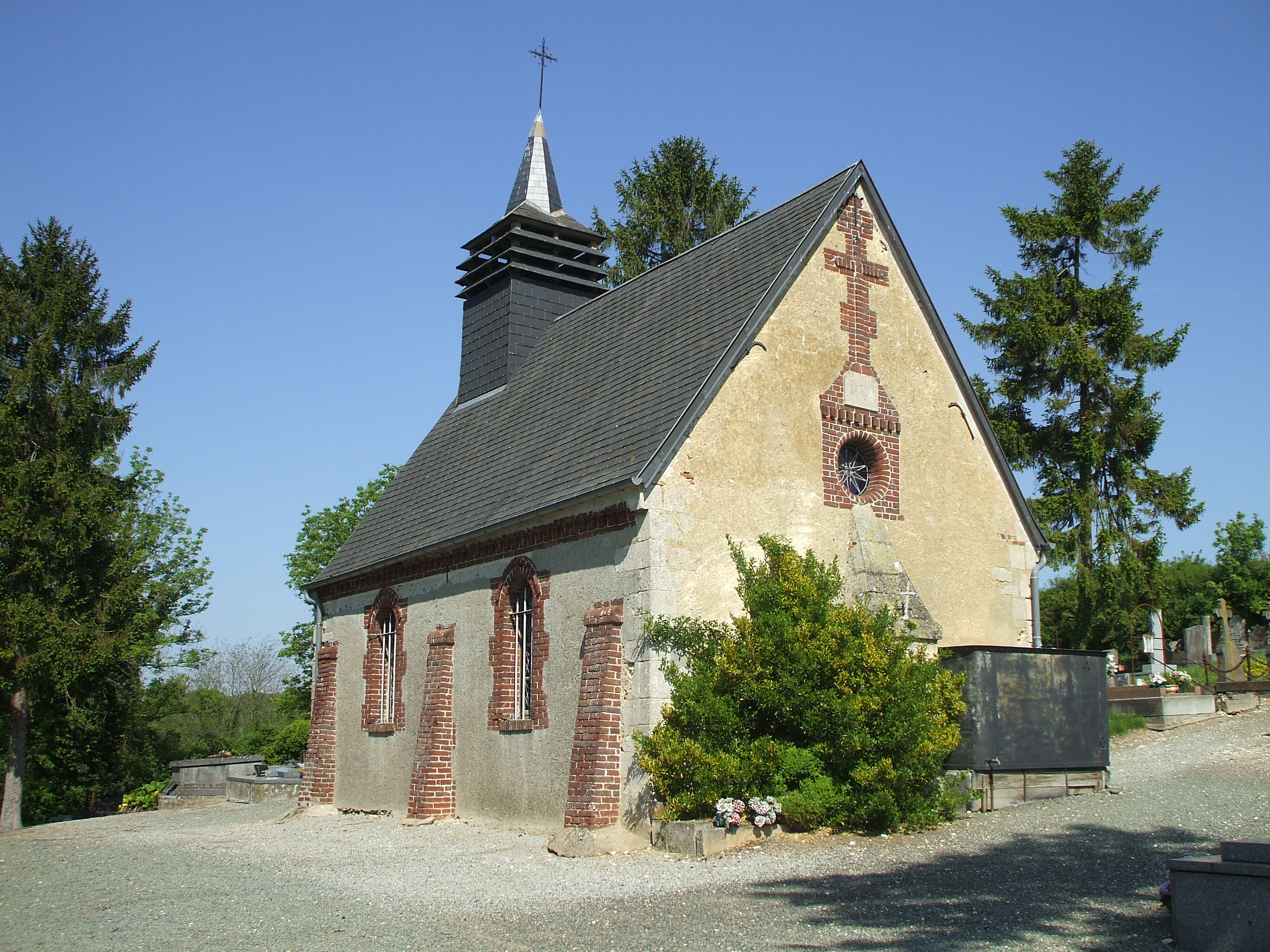 chapelle du cimetiere de Mortefontaine en thelle Oise France